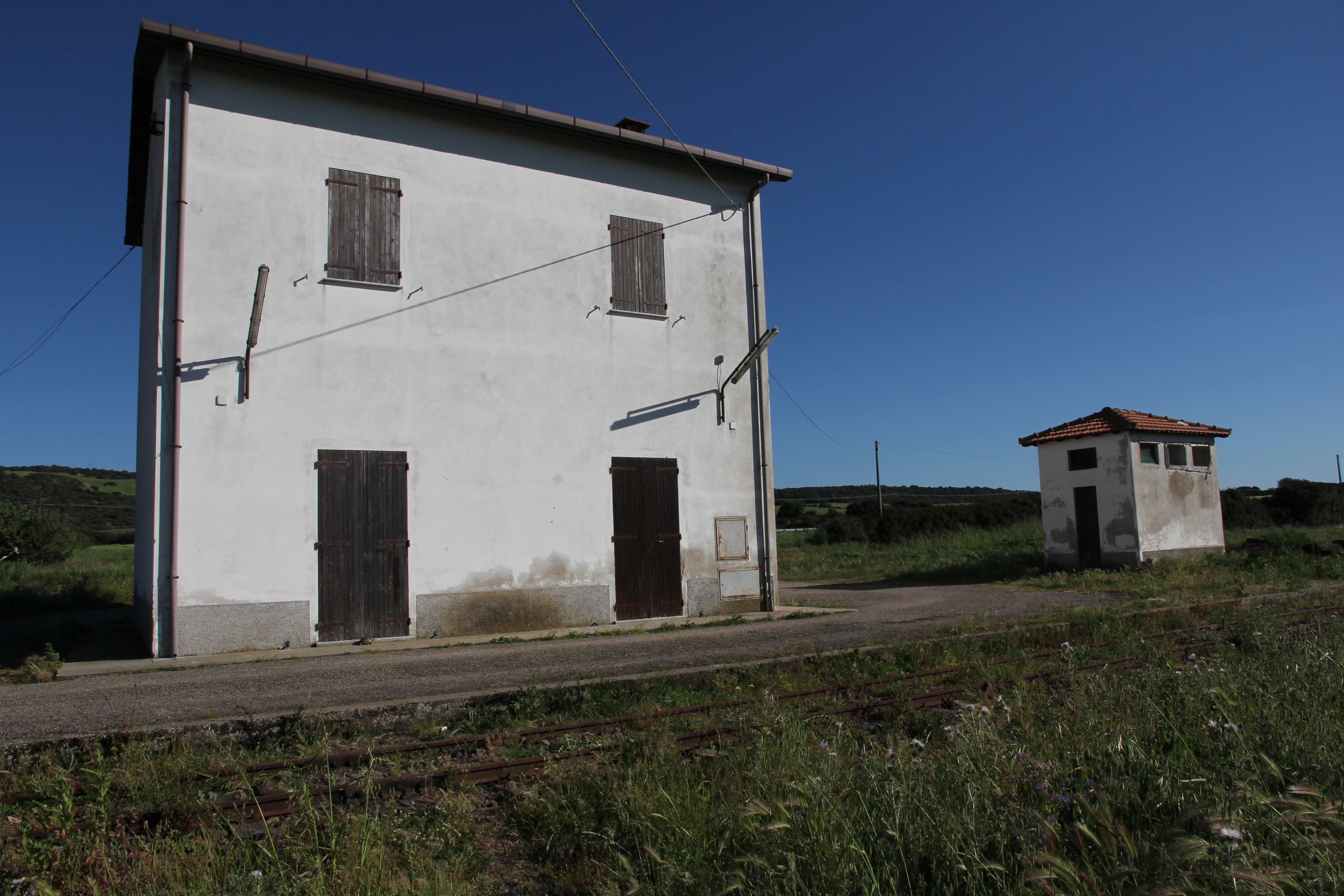 Perfugas, stazione ferroviaria di Coghinas - Ferrovia Sassari-Tempio-Palau